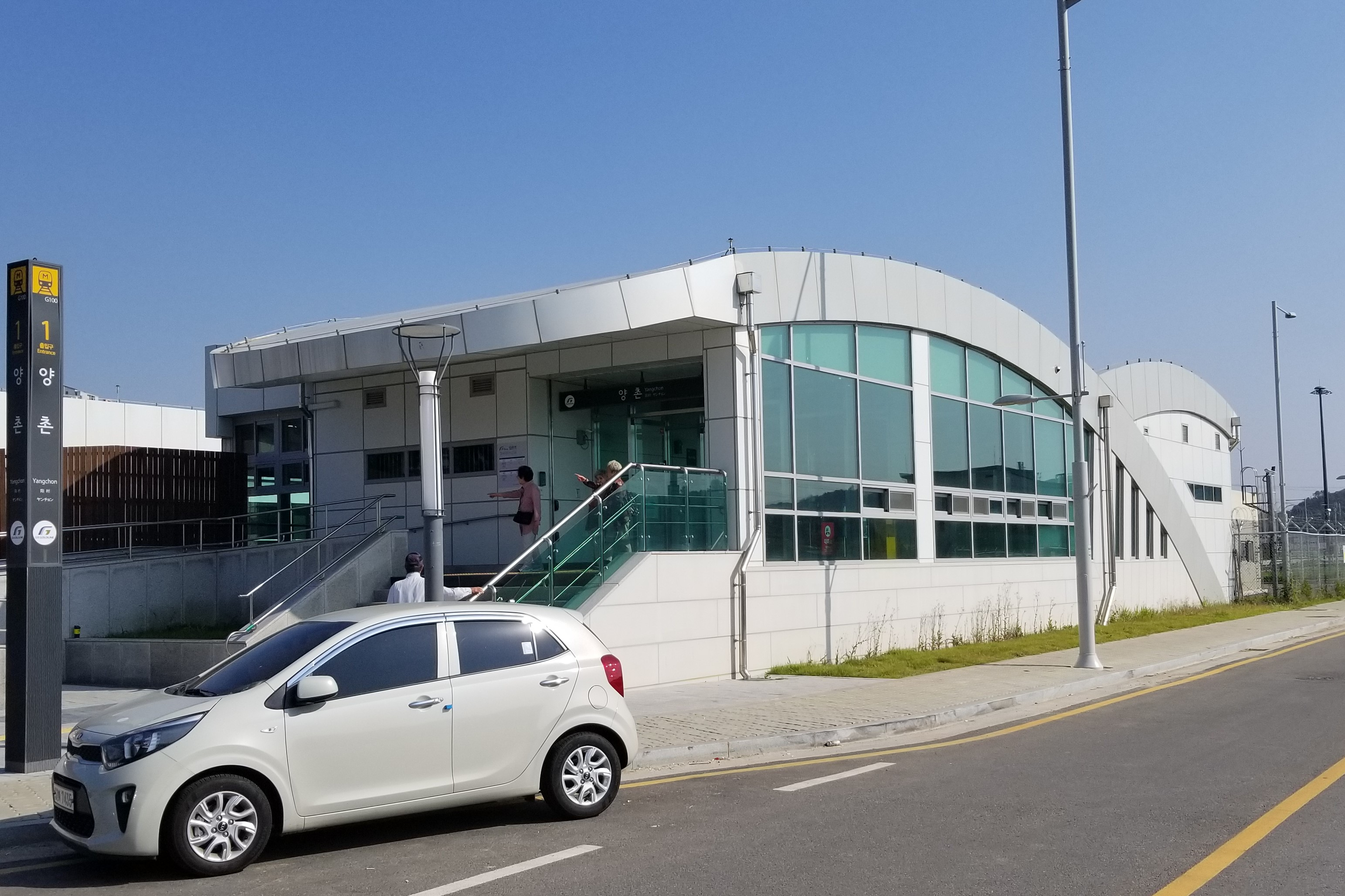 김포도시철도 양촌역